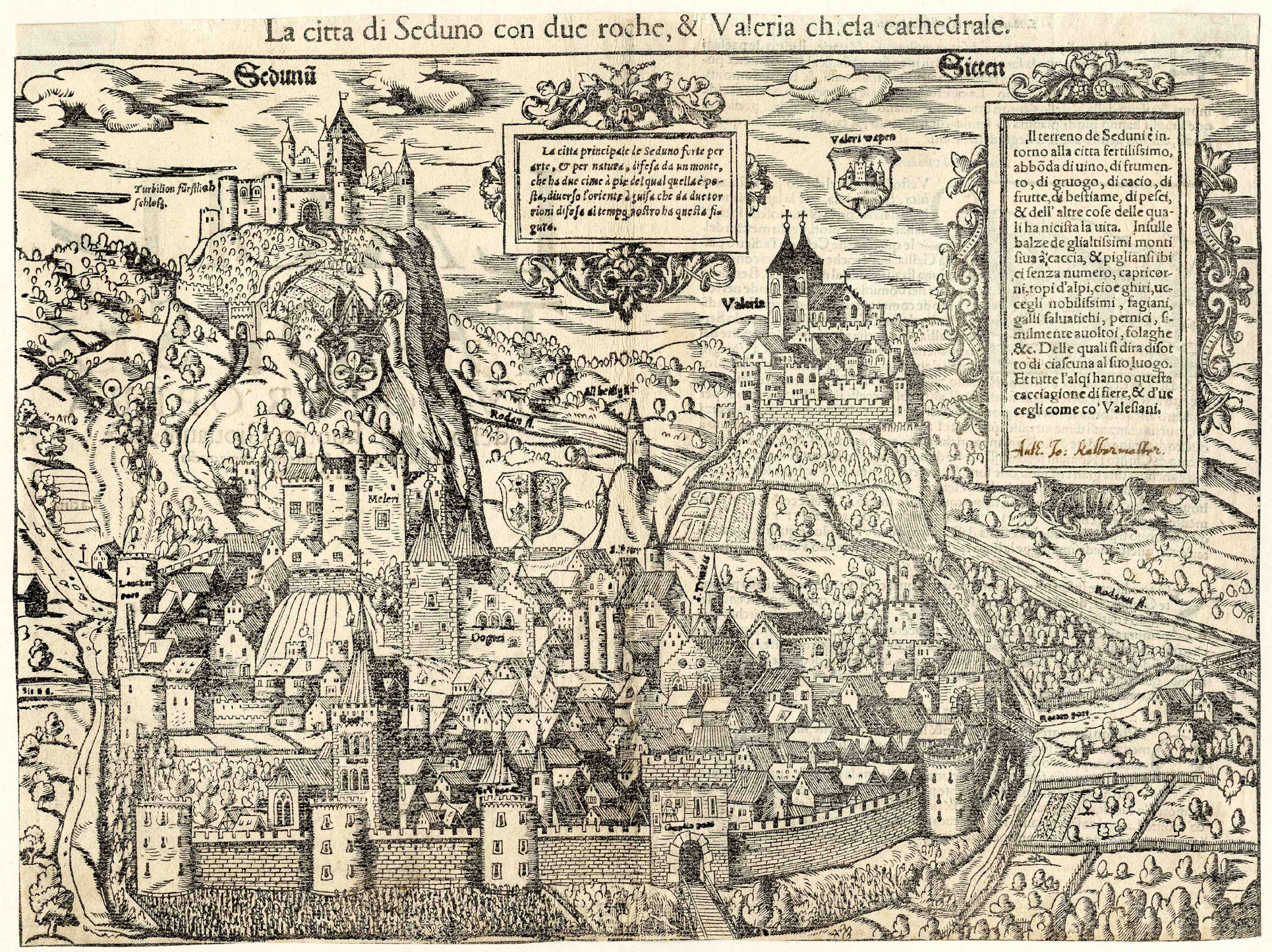 Ansicht von Sitten; Holzschnitt, vor 1550